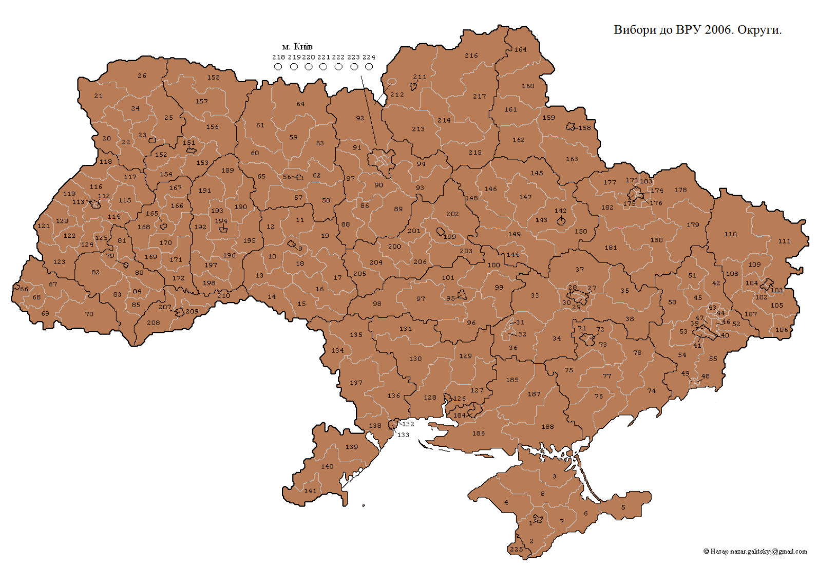 Україна. Парламентські вибори 2006. Виборчі округи.